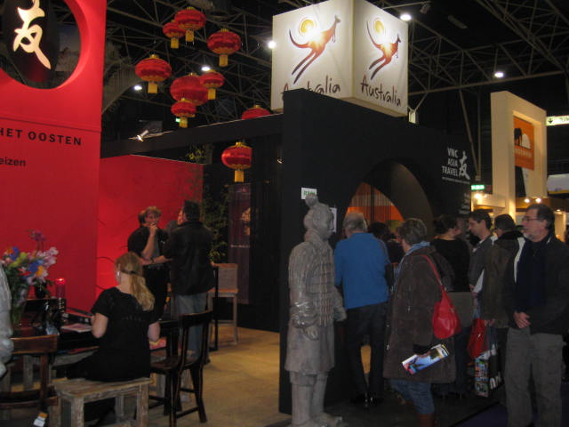 Vakantiebeurs 2009 in de Jaarbeurs te Utrecht, Nederland